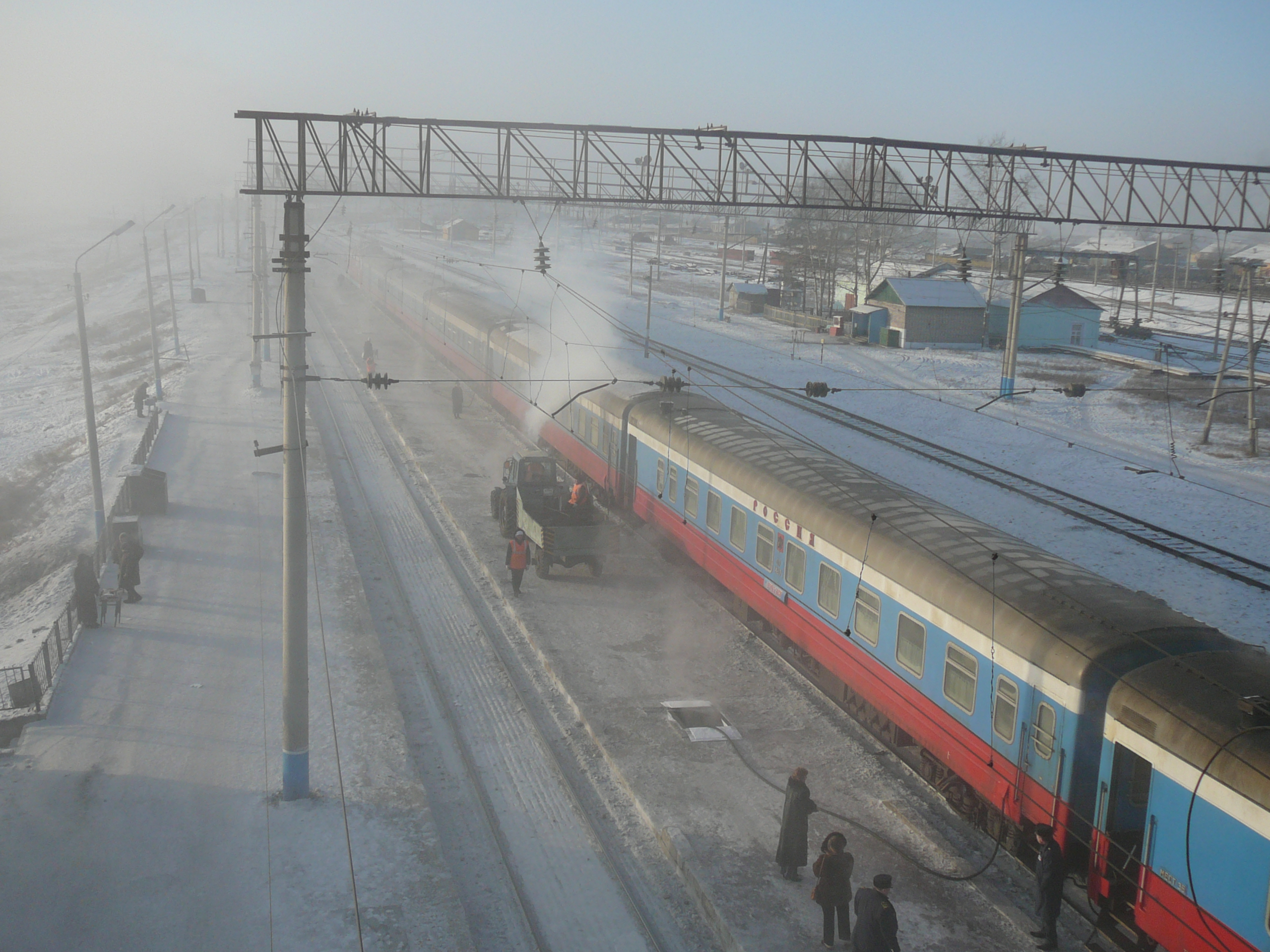 Zughalt des Rossija in Mogatscha bei Temperaturen unter -40° C